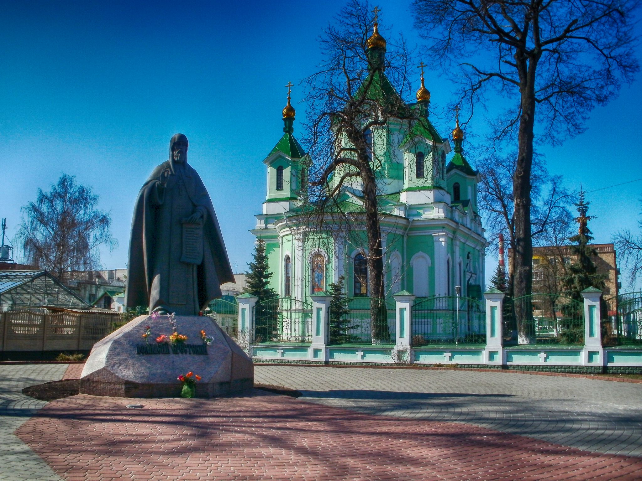 Беларуская (тарашкевіца): Сьвята-Сімяонаўскі сабор. г. Берасьце This is a photo of Belarusian heritage monument. Reference number: 113Г000016 ( WLM)